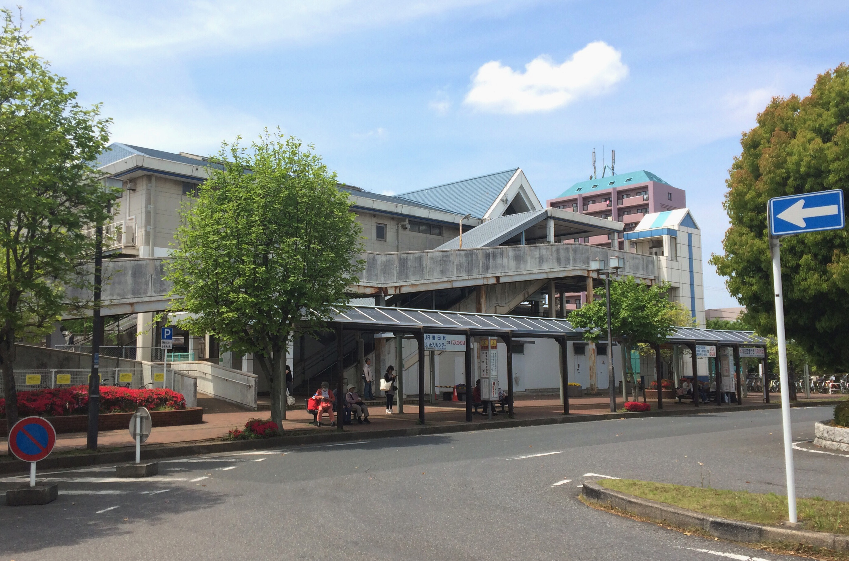 鎌取駅北口の写真です。